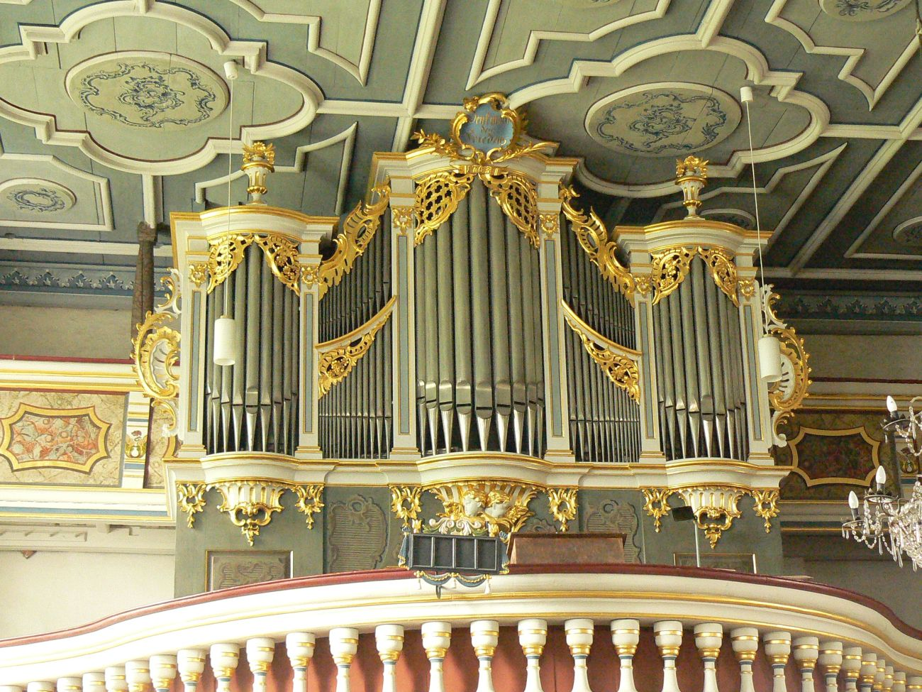 Cämmerswalde, Evang.-luth. Kirche, Oehme-Orgel (1763)